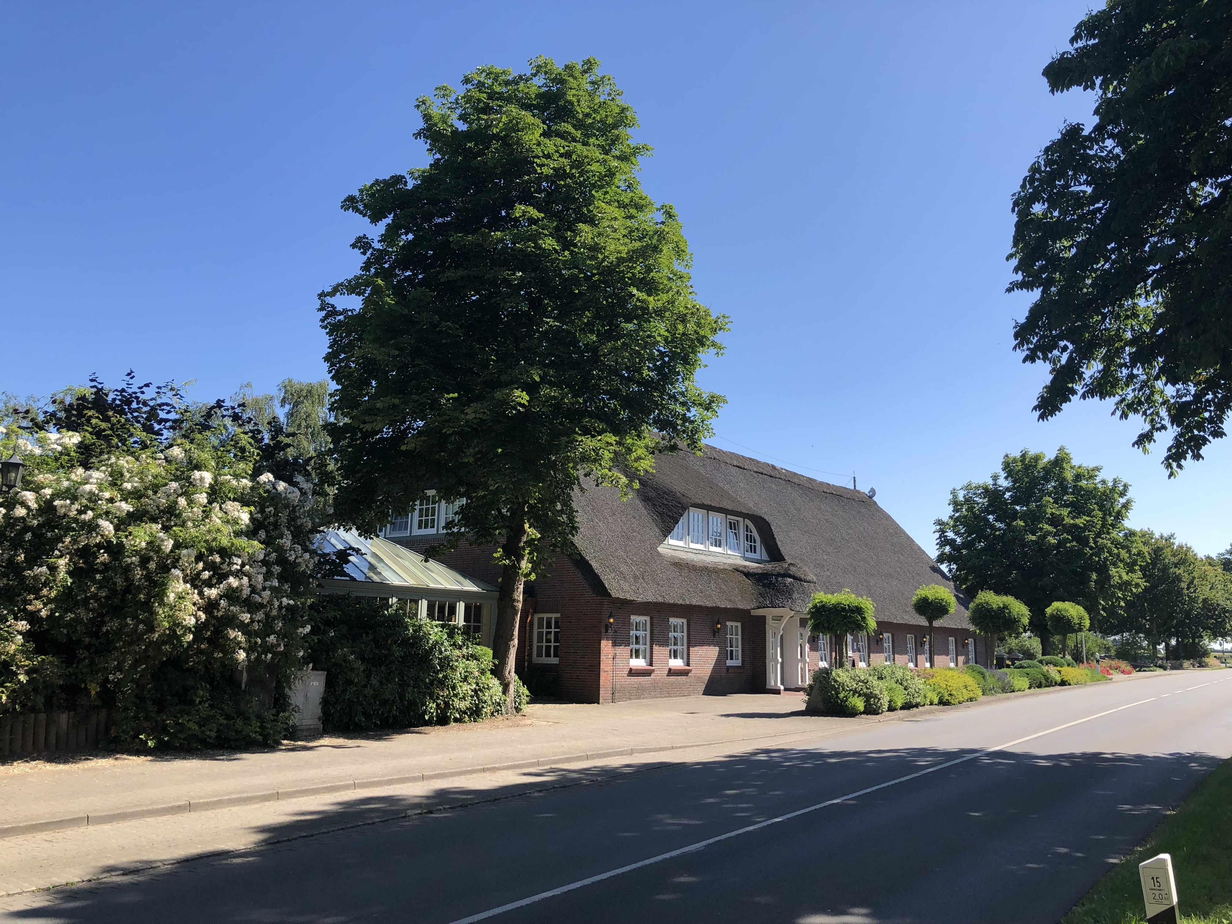 Viebrocks Gasthuus in Hogebrügg (Rutenbeek)